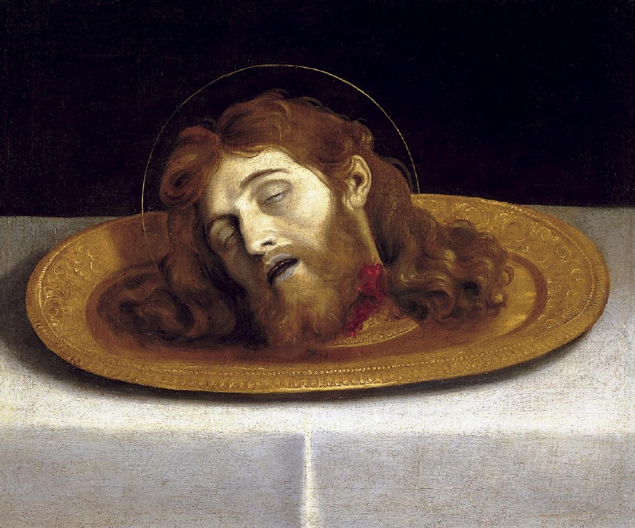 La obra representa la cabeza del profeta San Juan Bautista, precursor del Mesías, cercenada y colocada en una bandeja.